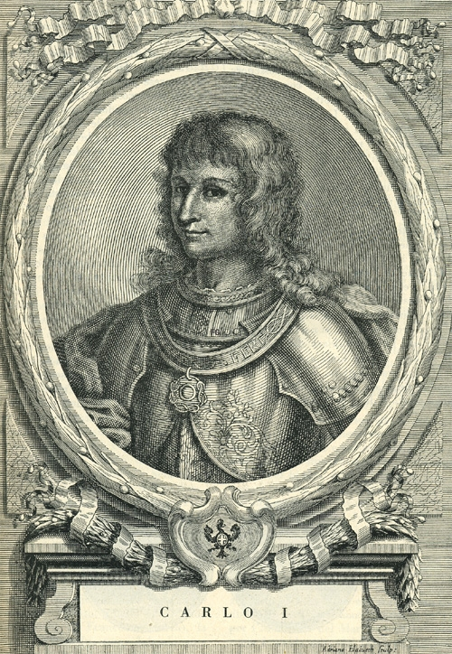 Carlo I di Savoia (1468–1490)